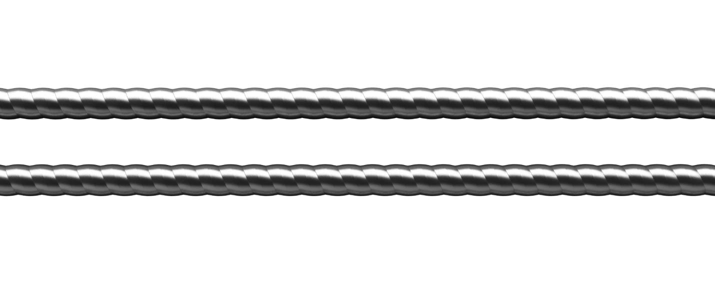 Профилированные трубки сильфонно-трубчатого теплообменника